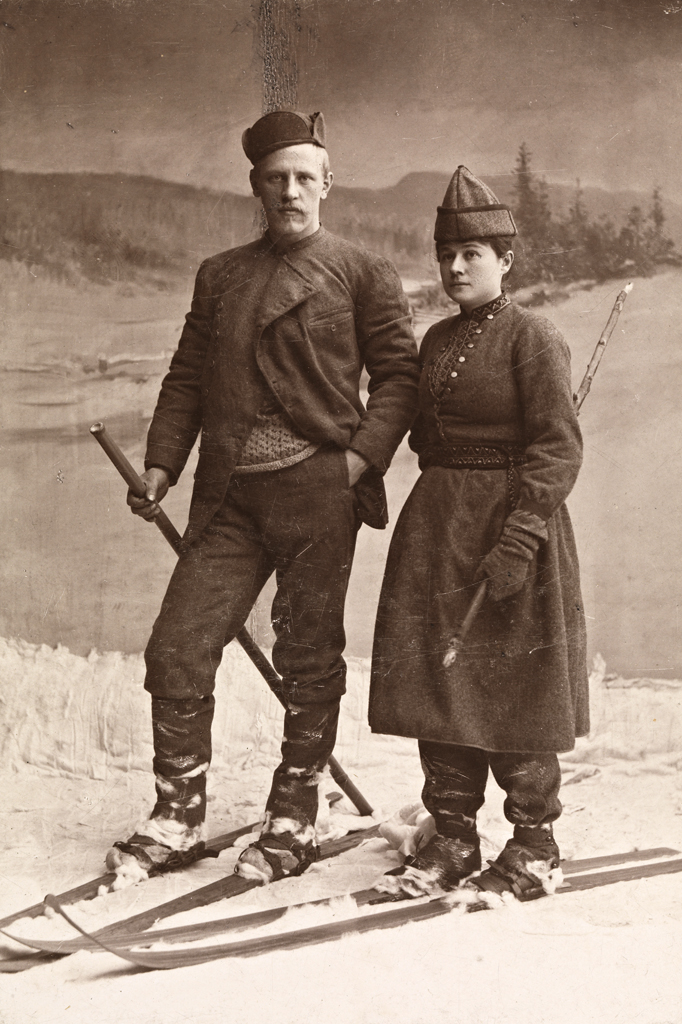 Ева и Фритьоф Нансены на лыжах